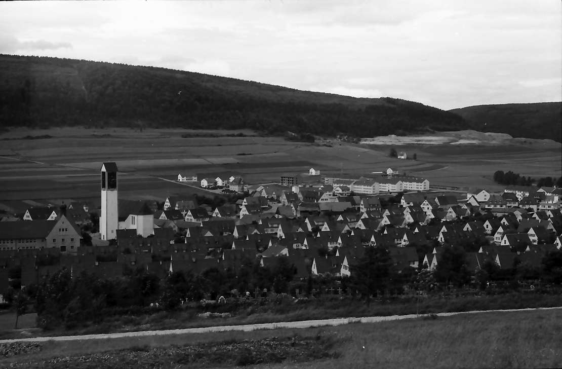 Blumberg, Gesamtansicht von Süden im Jahr 1960